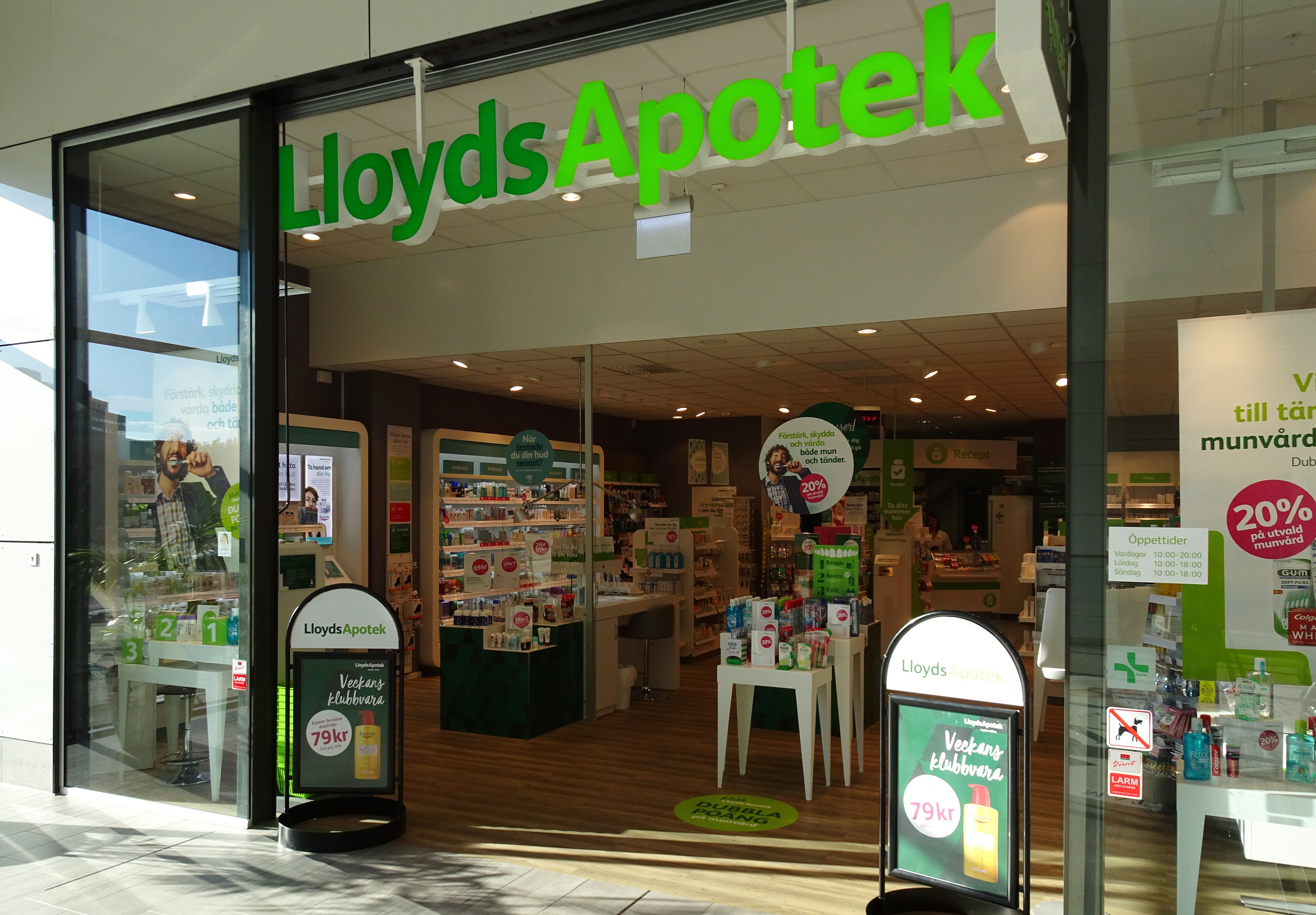 Lloyds apotek Kungens kurva